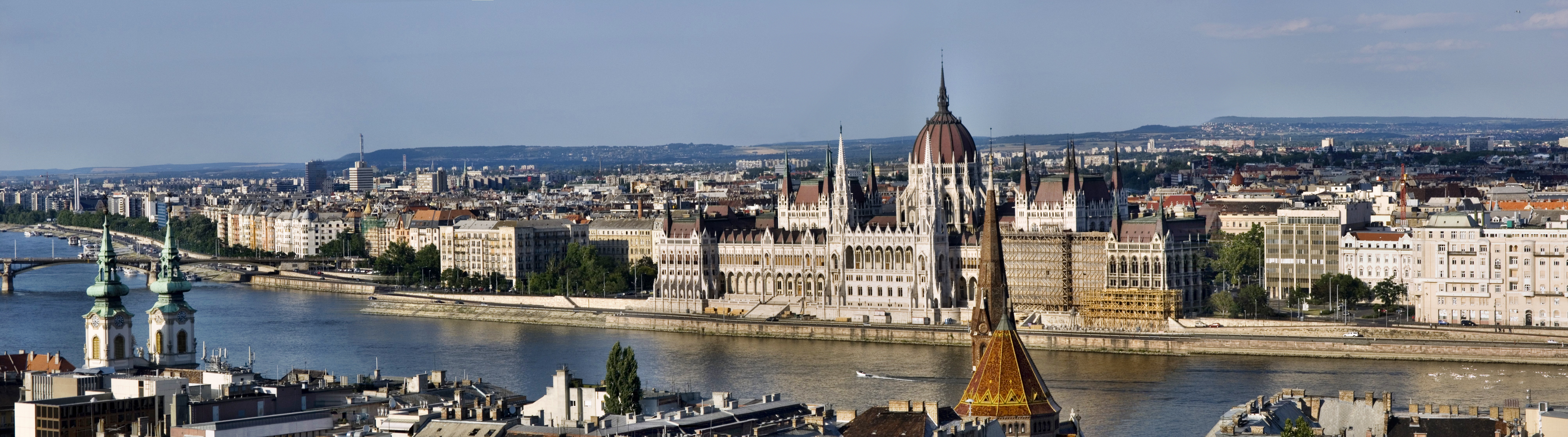 Венгрия, Будапешт, вид на Пешт (парламент) с Рыбацкого бастиона